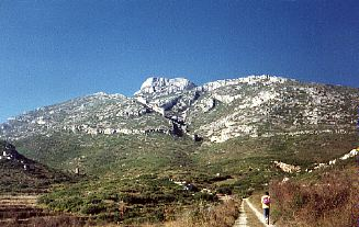 Le sommet du Garlaban (715m) vu depuis la route de Lascours (près d'Aubagne) Auteur : Nicolas Chabert